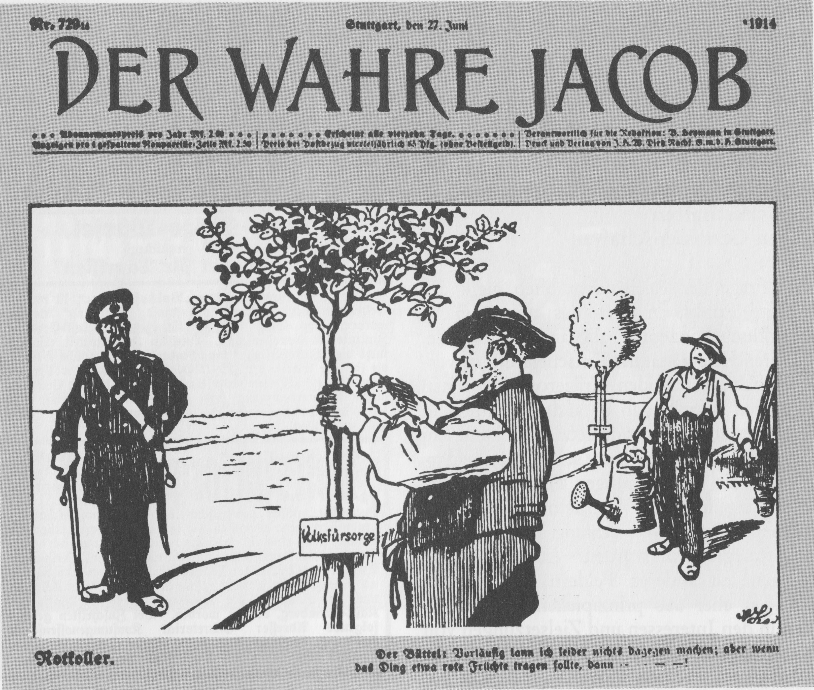 Karikatur aus der Zeitschrift "Der Wahre Jacob" vom 24.Juni 1914 zur Volksfürsorge. Text: "Der Büttel: Vorläufig kann ich leider nichts dagegen machen; aber wenn das Ding etwa rote Früchte tragen sollte, dann...!"